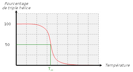 Température de fusion du collagène.jpg